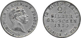 Silbergros: 2½ Groschen (Preussen) (1850)